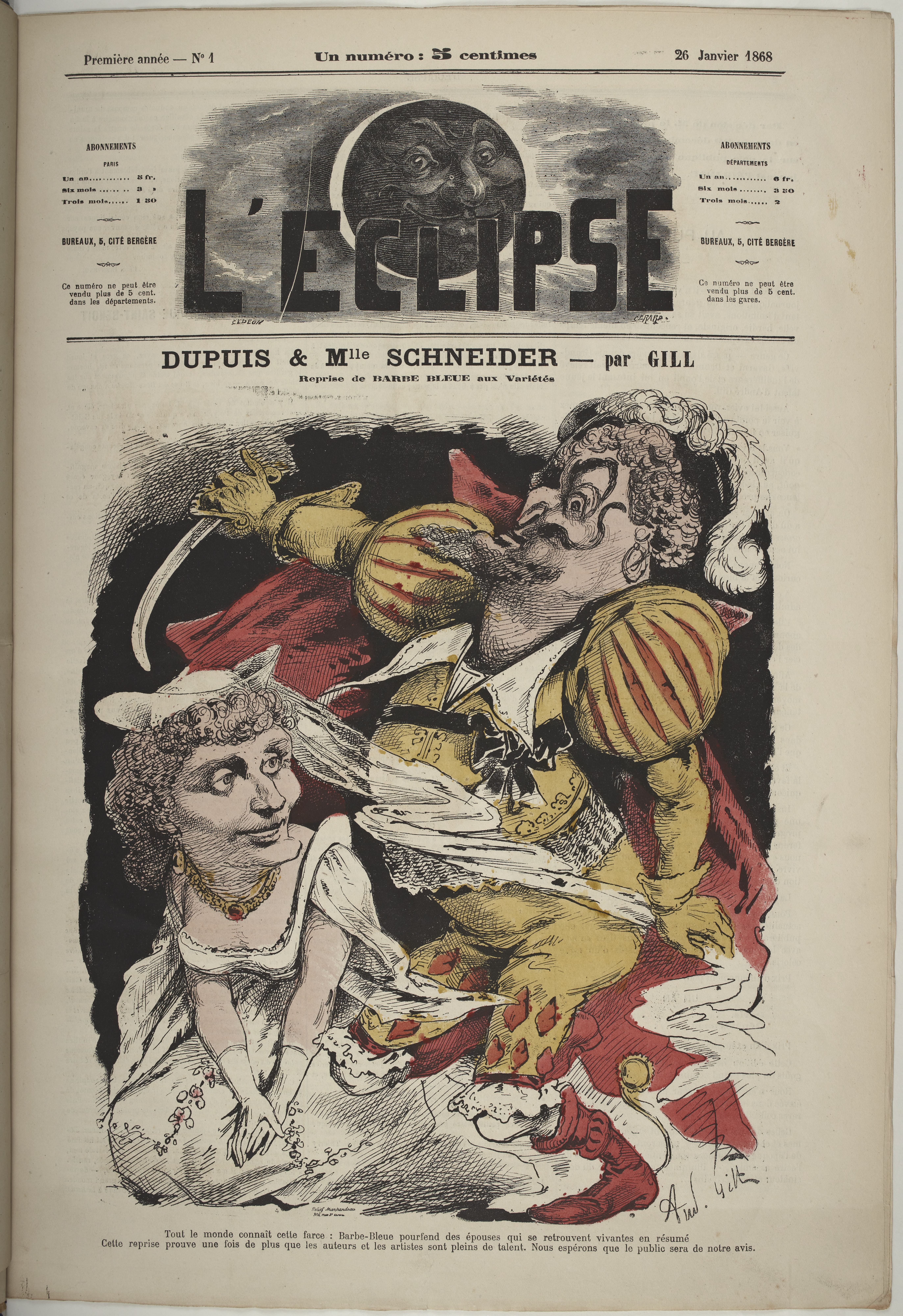 Caricature of Dupuis & Mlle Schneider - par Gill. Reprise de Barbe bleue aux Variétés Cover of L'Eclipse 26 January 1868